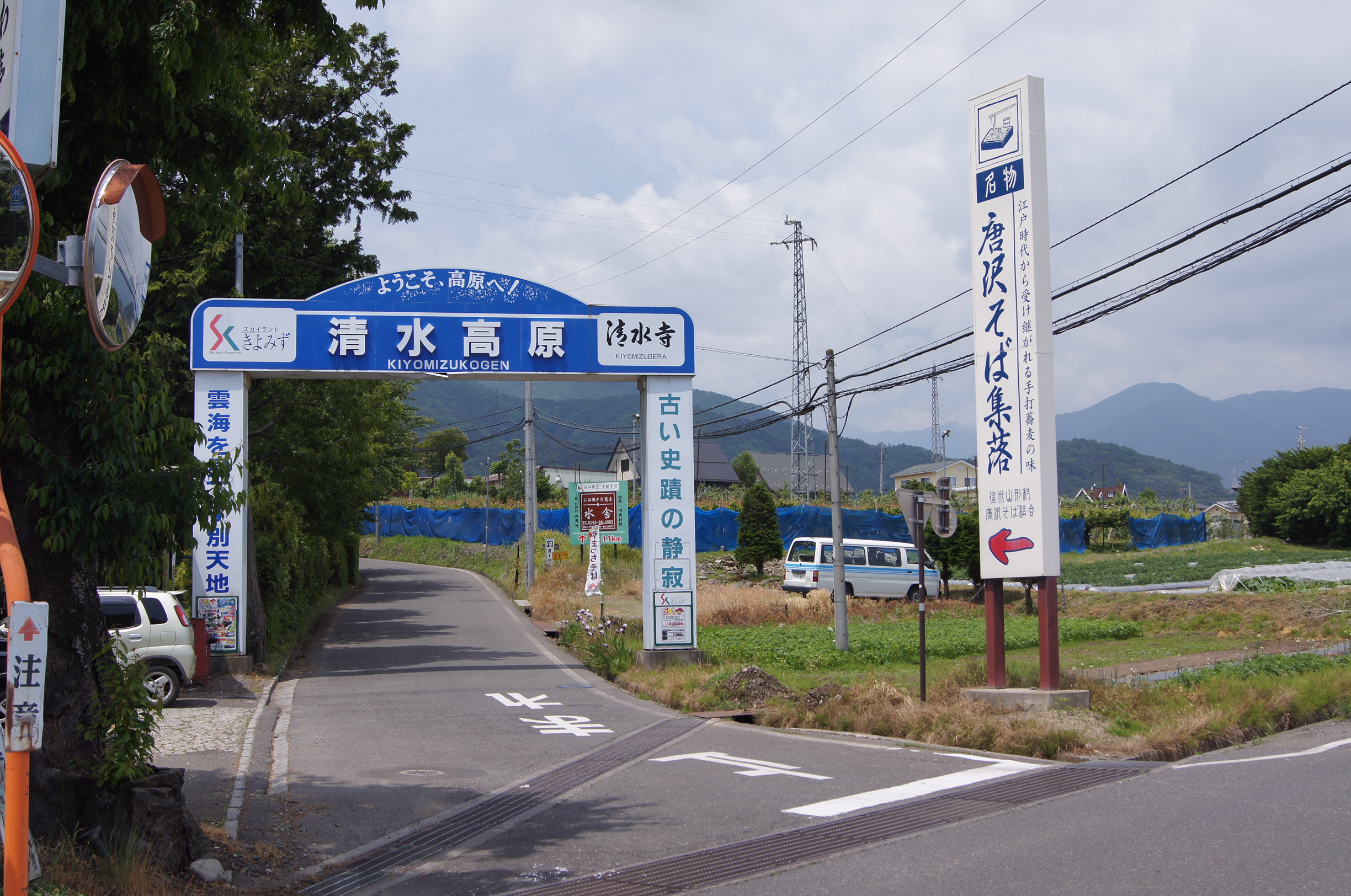 長野県東筑摩郡山形村で、通称サラダ街道（県道）から、清水寺などのある清水高原、唐沢そば集落に向かうための入り口の様子